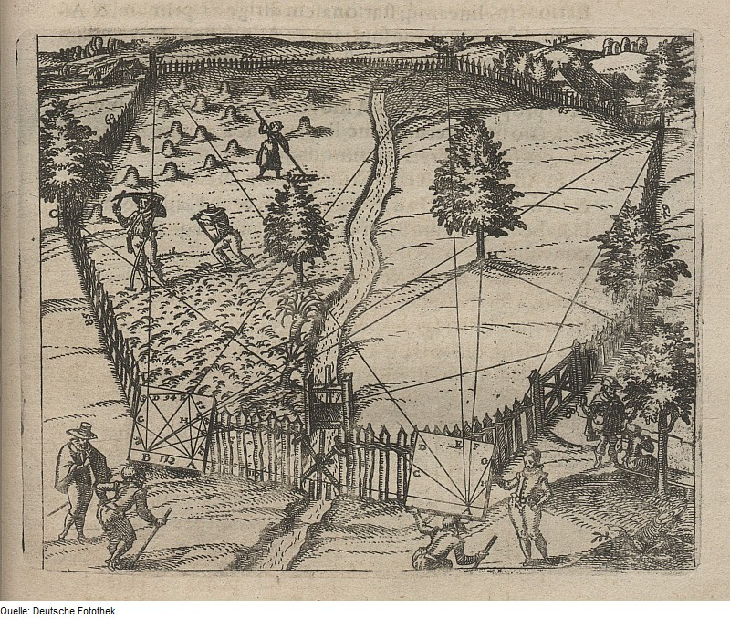 Original image description from the Deutsche Fotothek Geometrie & Vermessung & Gelände & Quadrant